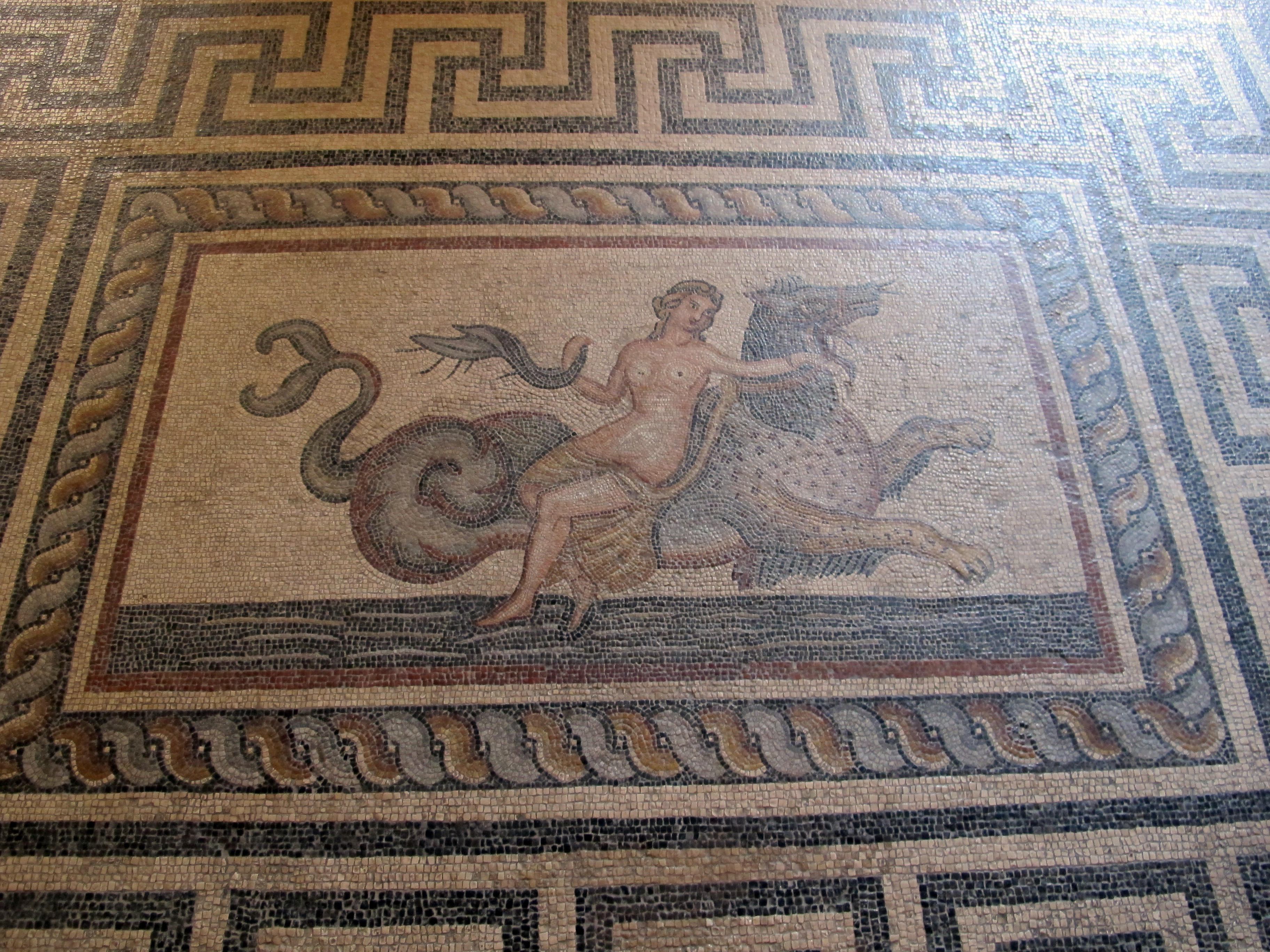 Palazzo dei gran maestri di rodi, sala del cavalluccio, mosaico della ninfa sull'ippocampo, da kos, periodo romano